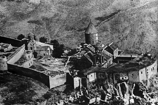 Տաթևի վանքը 1918 թվականին